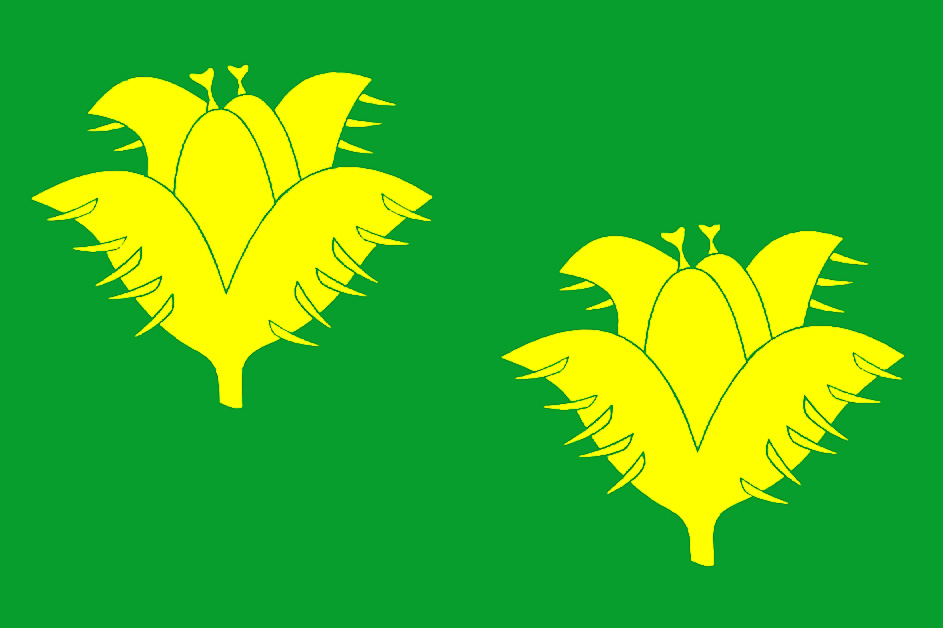 Vlajka obce Bukvice (okres Jičín)